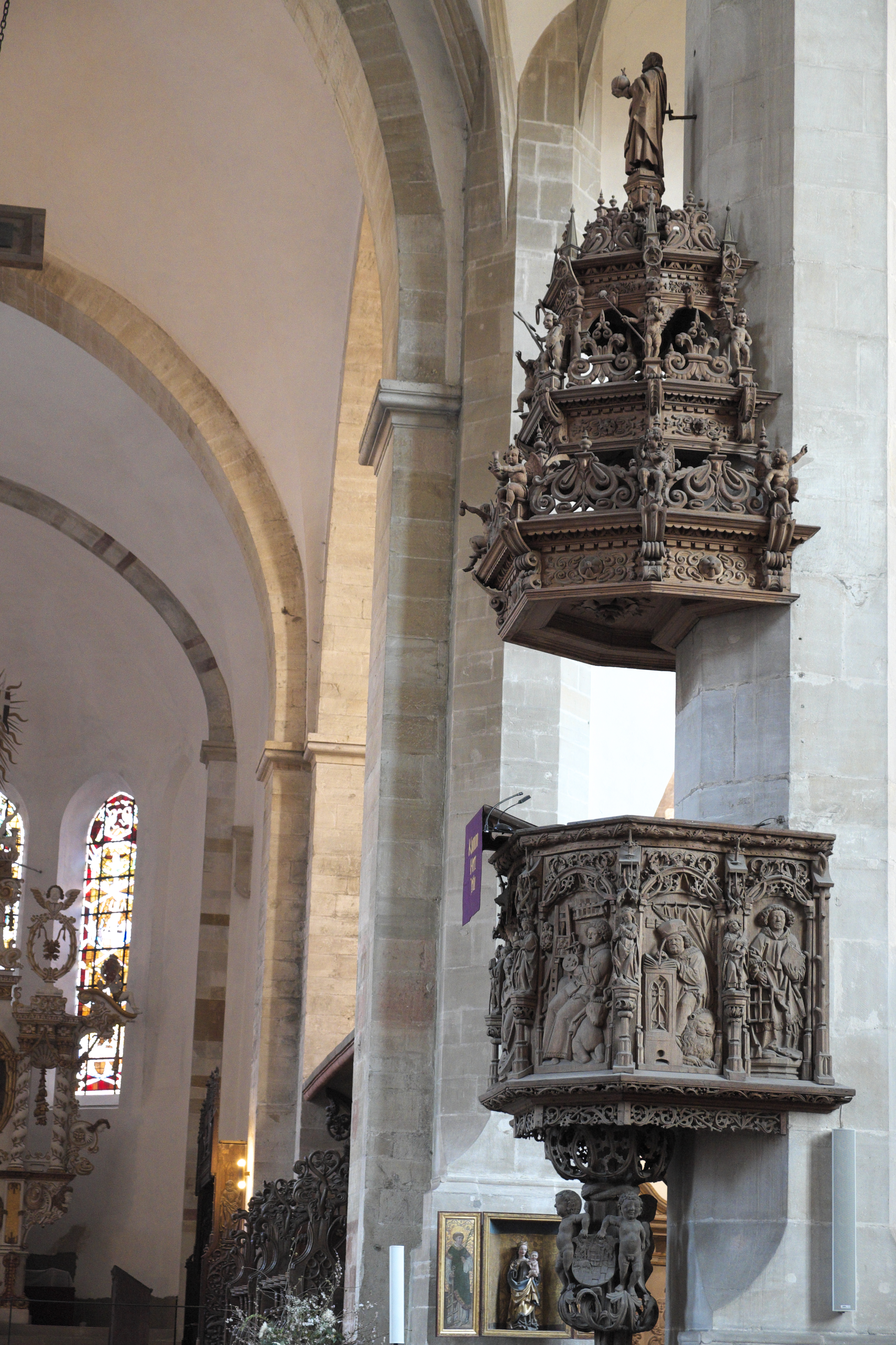 Dom St. Johannes und St. Laurentius in Merseburg im Saalekreis in Sachsen-Anhalt/Deutschland, Kanzel, um 1517